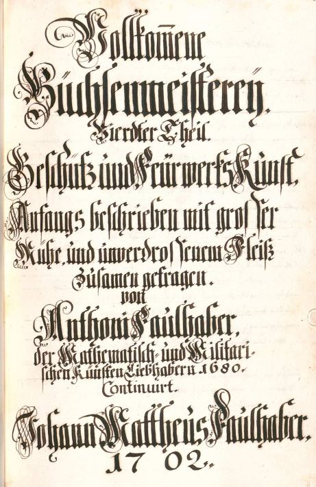 Buch: Artilleriekunst III - IV, Proportionierung und Gebrauch der Geschütze, Ernst- und Lustfeuerwerk. Textband. - BSB Cod.icon. 227 a. Titelblatt des IV. Teiles. Autoren: Anton (Vater) und Johann Matthäus Faulhaber (Sohn), erschienen 1680 bis 1702 in Ulm. Gefunden in: Digitale Sammlungen der Bayerischen Staatsbibiliothek München. URN: urn:nbn:de:bvb:12-bsb00052318-3.